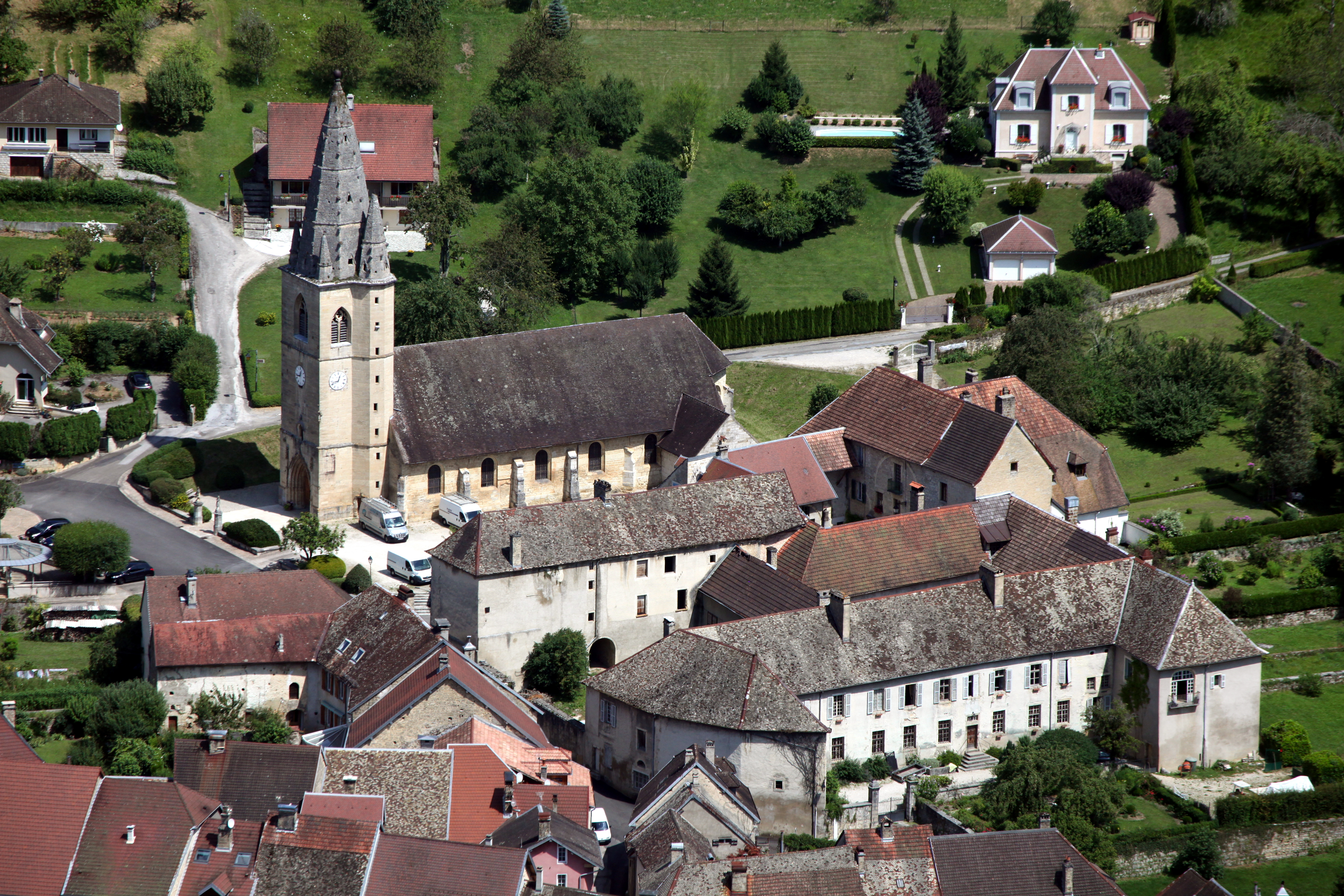 Vue de Mouthier-Haute-Pierre (Doubs) depuis le belvédère du Moine à Renédale.